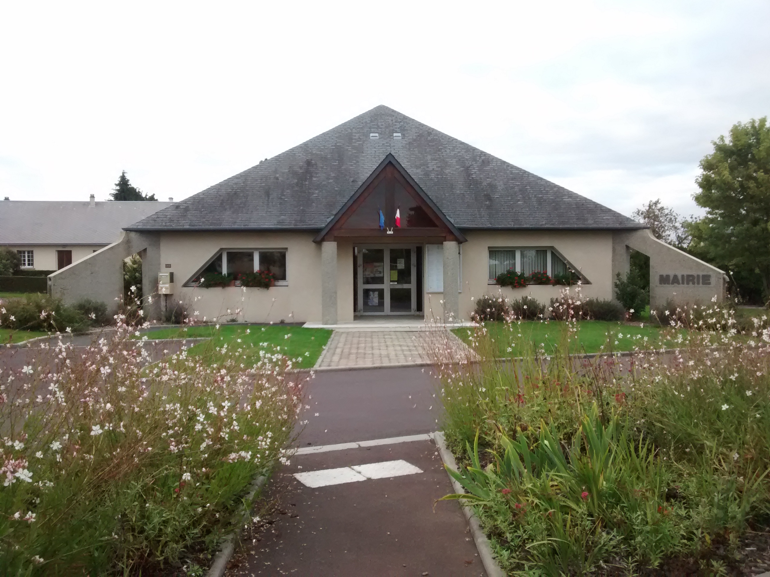 Saint-Ébremond-de-Bonfossé ,Manche